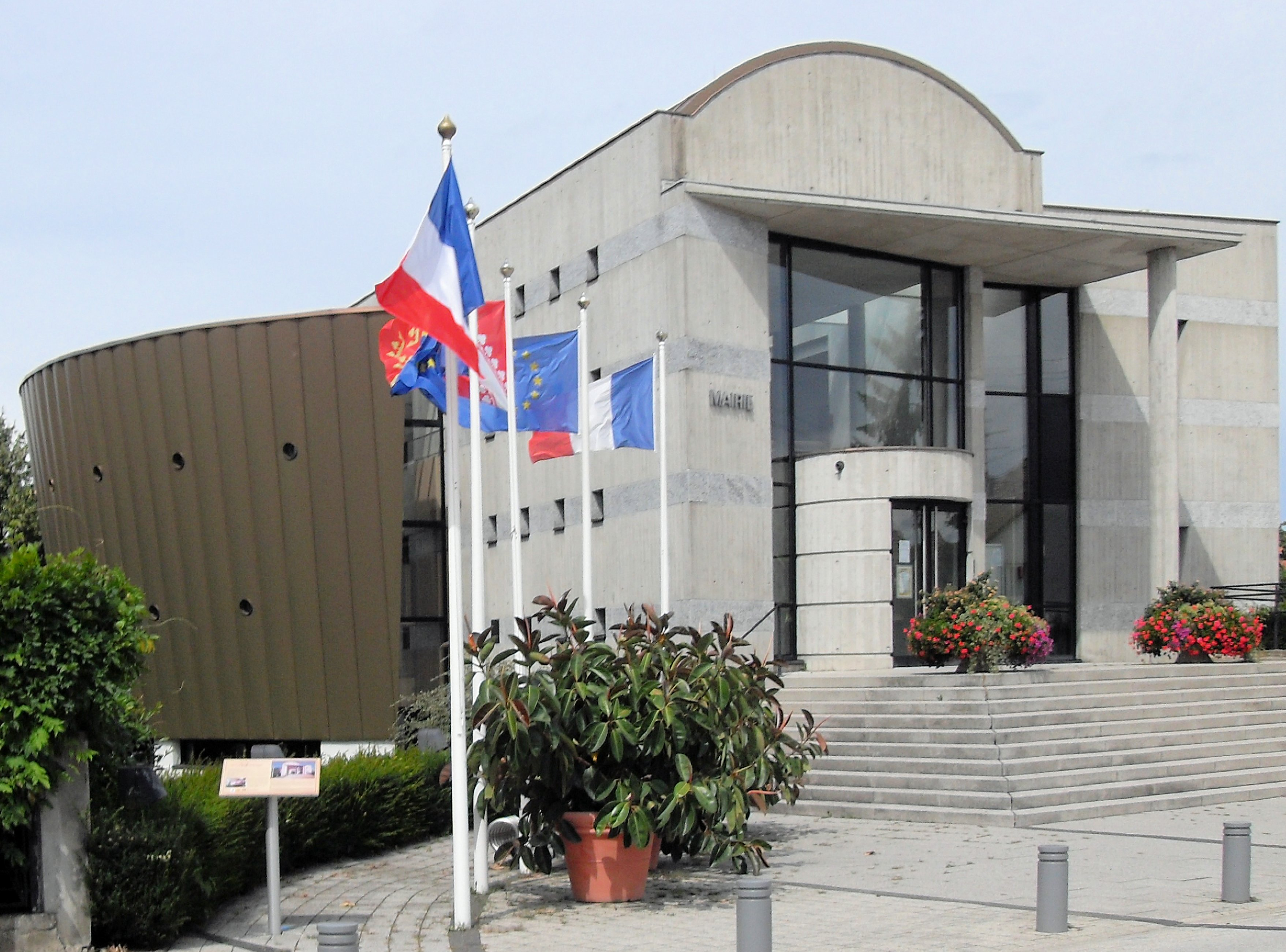 La mairie de Bantzenheim